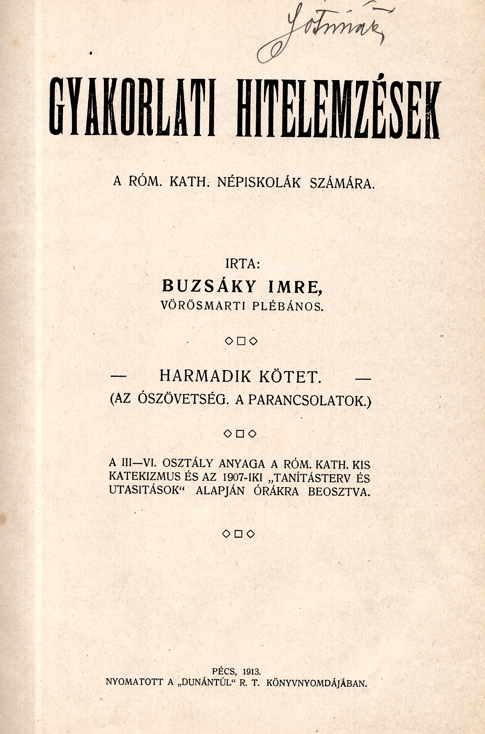 Buzsáky Imre: Gyakorlatai hitelemzése (1913)